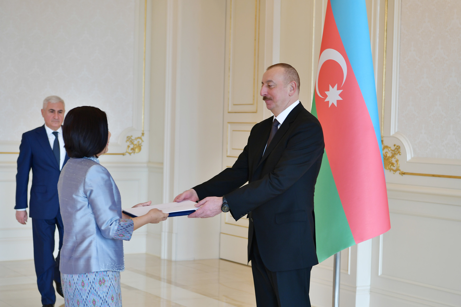 Prezident İlham Əliyevə etimadnaməni təqdim edərkən